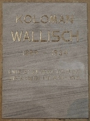 Gedenktafel zur Erinnerung an Koloman Wallisch. Die Inschrift lautet: "KOLOMAN / WALLISCH / 1889 − 1934 / EWIG IST DIE REVOLUTION UND / UNSTERBLICH IHR MÄRTYRER." Diese Tafel befand sich ursprünglich im ehemaligen Galgenhof des Kreisgerichtes Leoben (Dominikanergasse 13). Als dieses 2007 zum "Leoben City Shopping" (LCS) umgebaut wurde, wurde die Tafel an einem 4 m hohen und 1,5 m breiten Steinblock beim Osteingang des LCS angebracht, dem heutigen "Koloman-Wallisch-Platz".